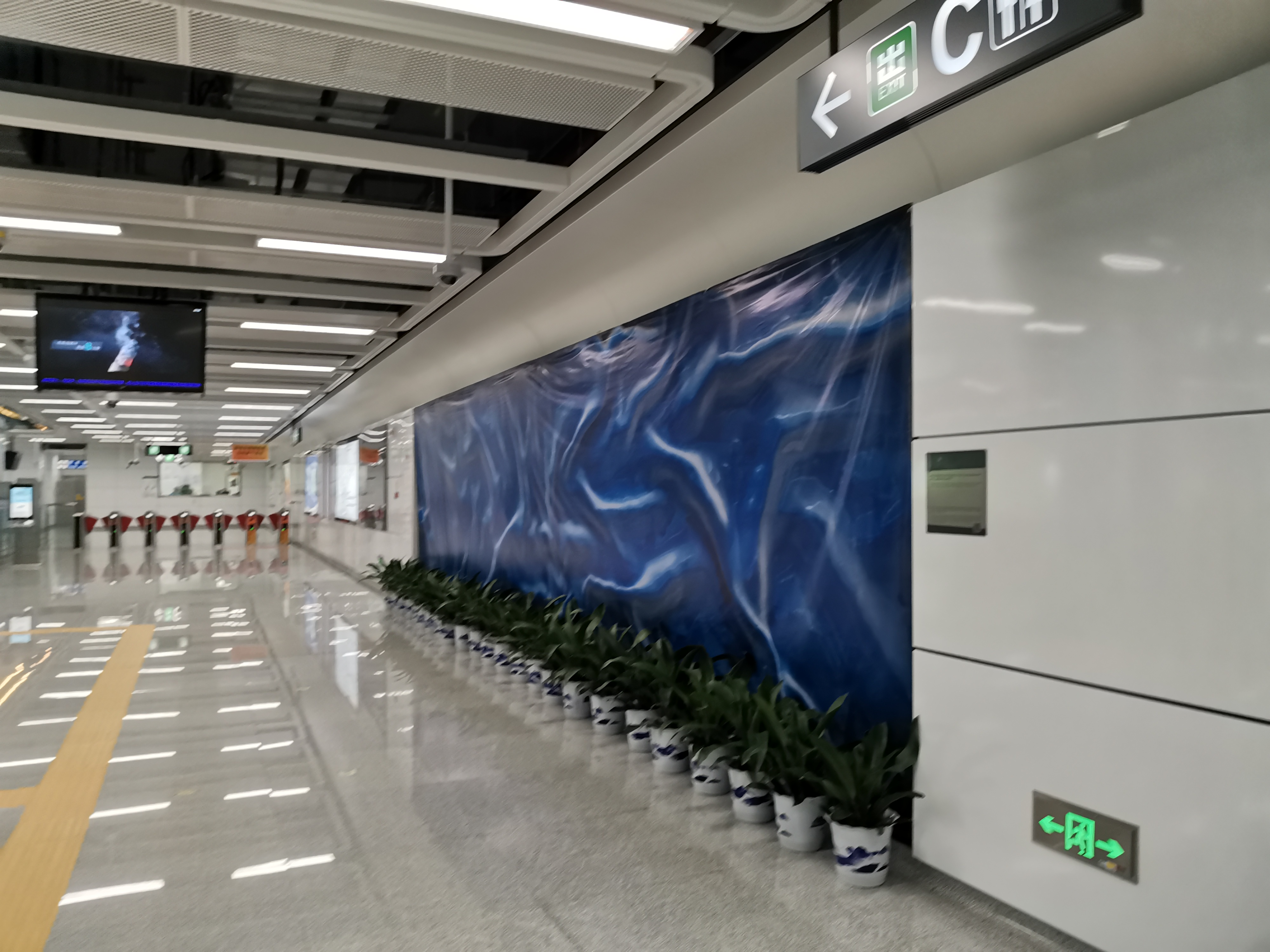 怡海站艺术墙，以海洋为主题